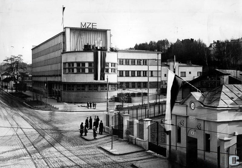 Міські електричні заклади у Львові